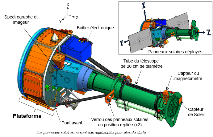 Schéma du télescope ultraviolet de la NASA IRIS - Version avec les libellés en français